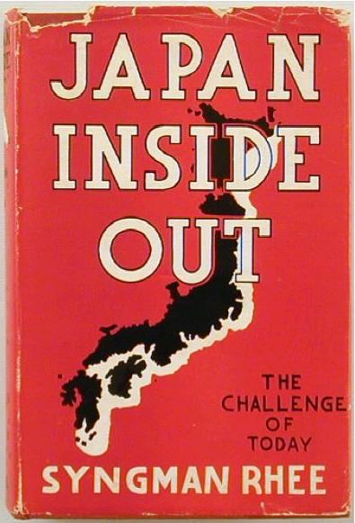 대한민국 초대 대통령 이승만이 1940년대 초반, 미국에서 저술한 '일본의 내막기'(Japan Inside out)